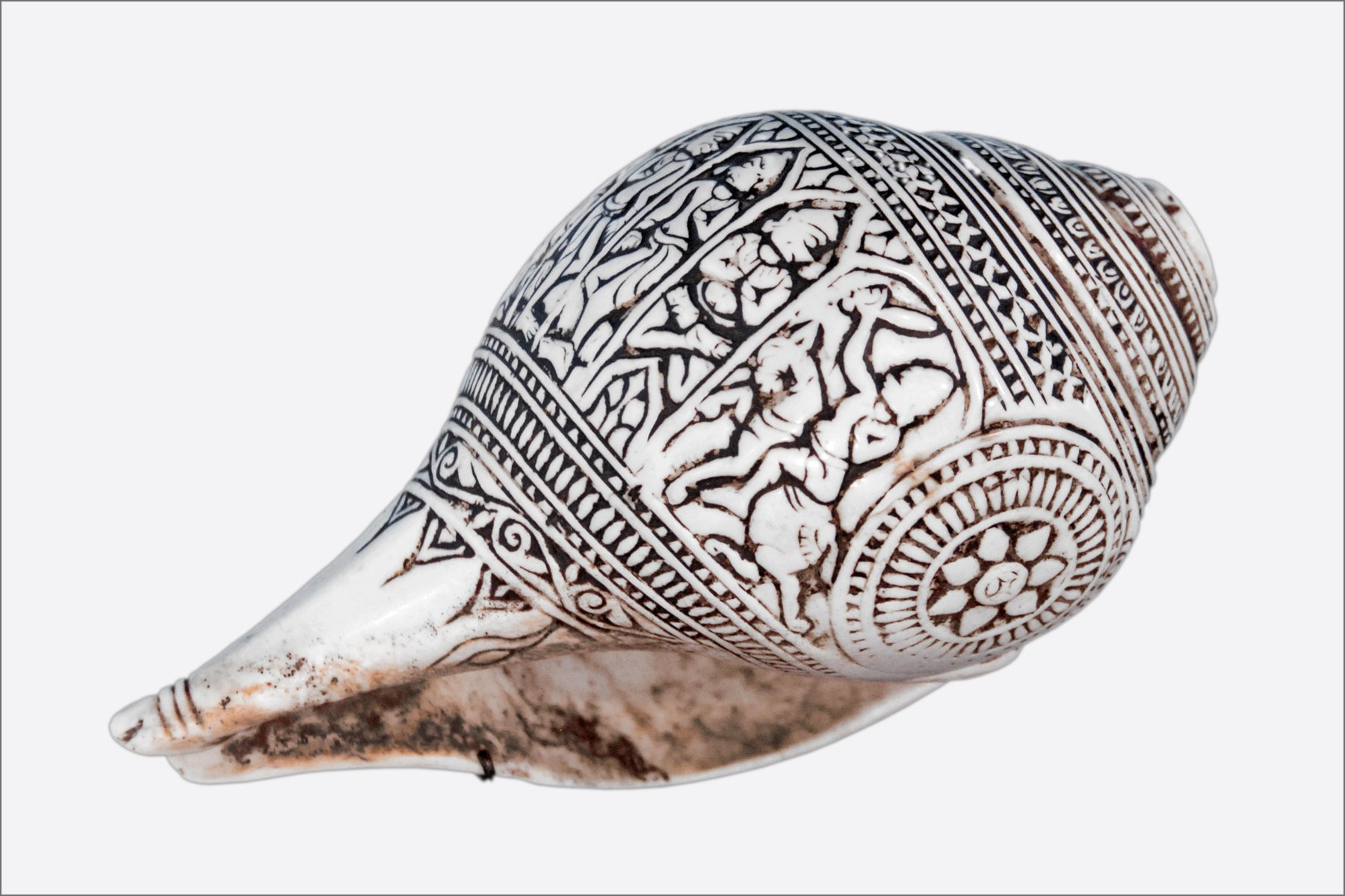 Conque à spirale Inde du Nord-Est, XIe - XIIe siècle Coquillage Turbinella Pyrum, bas relief Pâte brune dans les parties creuses Musée des arts asiatiques Instrument réservé à Vishnu dont elle porte l'illustration gravée de ses dix avatars (manifestations permettant au dieu de descendre sur terre pour y remettre de l'ordre). La conque, symbole de puissance et de souveraineté, fait partie des attributs permettant au dieu de lutter contre les démons menaçant l'ordre du monde. Extrait du site officiel __________ Le musée, inauguré en 1998, a été conçu par l'architecte japonais Kenzo Tange (1913-2005) au sein du parc Phoenix à Nice (le parc Phoenix est un parc floral situé près de l'aéroport). L'initiative de cette construction remonte à l'époque de Jacques Médecin (1928-1998) , maire de Nice de 1966 à 1990 qui souhaitait y exposer des oeuvres de Pierre-Yves Trémois et des pièces d'art asiatique que l'artiste se proposait de donner à la ville de Nice. C'est P.-Y. Trémois qui aurait incité les responsables politiques à choisir ce célèbre architecte plutôt qu'un architecte local. En raison de la fuite à l'étranger de Jacques Médecin et de sa condamnation pour corruption, le projet initial a été abandonné et l'édifice est resté inoccupé durant plusieurs années. Le projet a été par la suite transformé par le conseil général des Alpes maritimes en musée des arts asiatiques, avec le soutien de la direction des musées de France et le concours du musée Guimet. Le premier conservateur du musée Marie-Pierre Foissy-Aufrère a brillamment relevé le défi de faire un musée évoquant les grandes civilisations asiatiques, de l'antiquité à aujourd'hui, dans un espace certes exceptionnel mais extrêmement exiguë. ___________________ "Le plan du musée repose sur deux formes géométriques fondamentales de la tradition japonaise; le carré, symbole de la terre,et le cercle, symbole du ciel....." Kenzô Tange site officiel article de Wikiipedia sur l'architecte